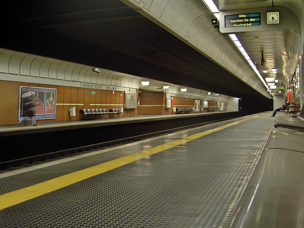 Stadtbahnhaltestelle Museum Koenig in Bonn